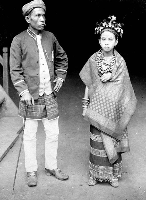 Repronegatief. Een echtpaar uit Lampung (Sumatra) in adatkostuum